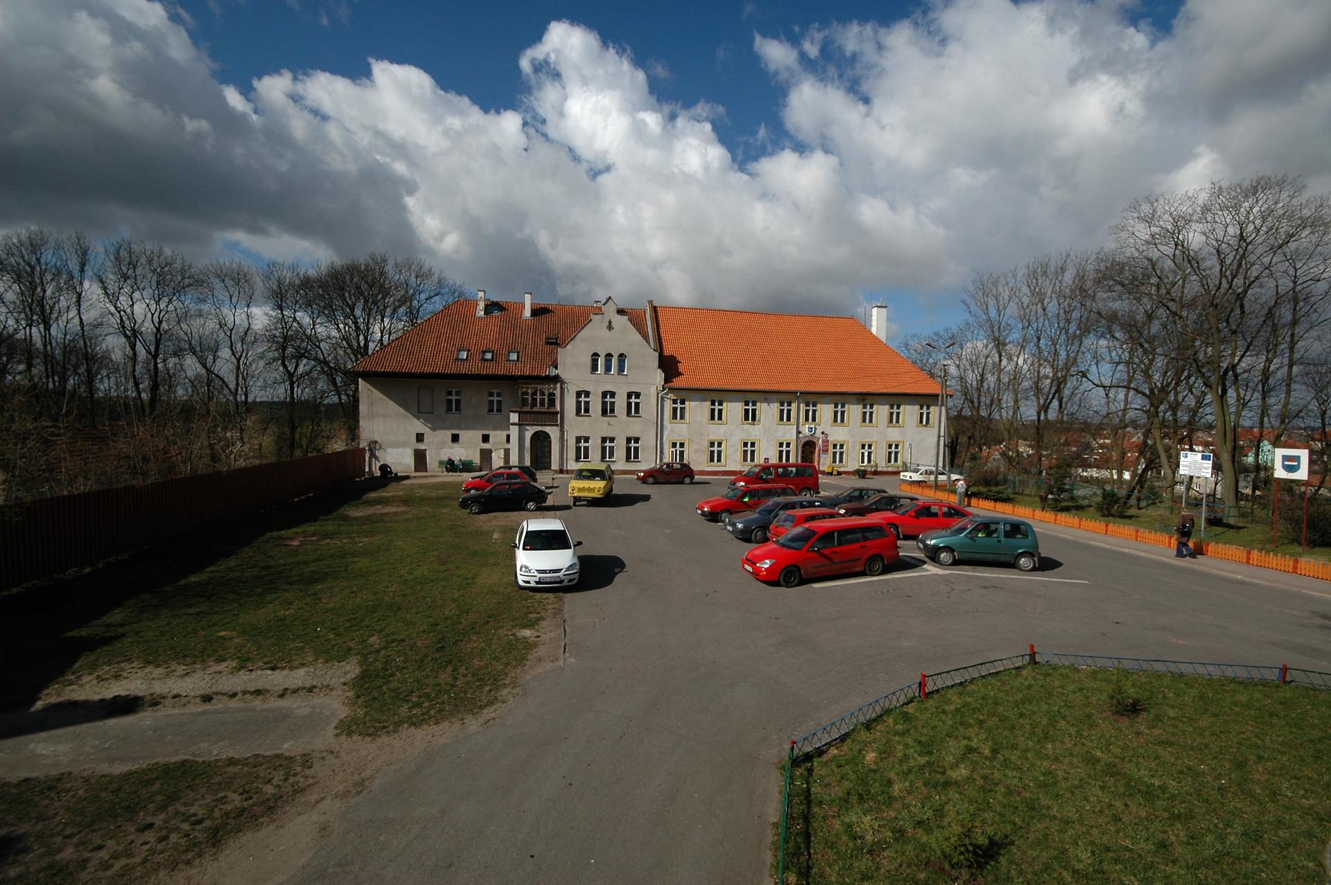 pozostałości dawnego zamku krzyżackiego Jeziorany, Plac Zamkowy, Jeziorany (miasto)